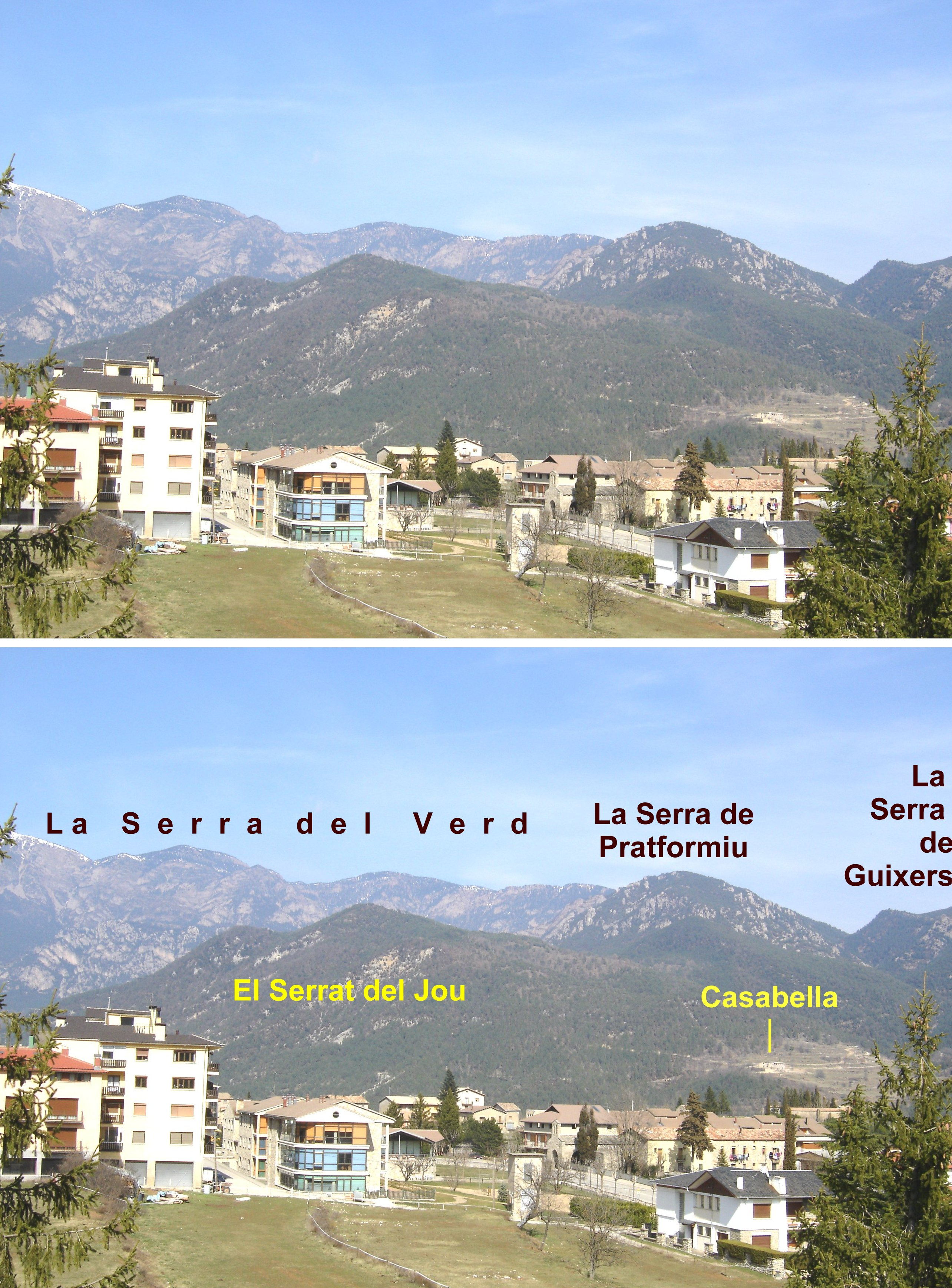 El vessant sud-oriental del Serrat del Jou (La Coma i la Pedra, la Vall de Lord, Solsonès) vist des de Sant Llorenç de Morunys. A la foto també es pot veure la Serra del Verd, la Serra de Pratformiu i la Serra de Guixers